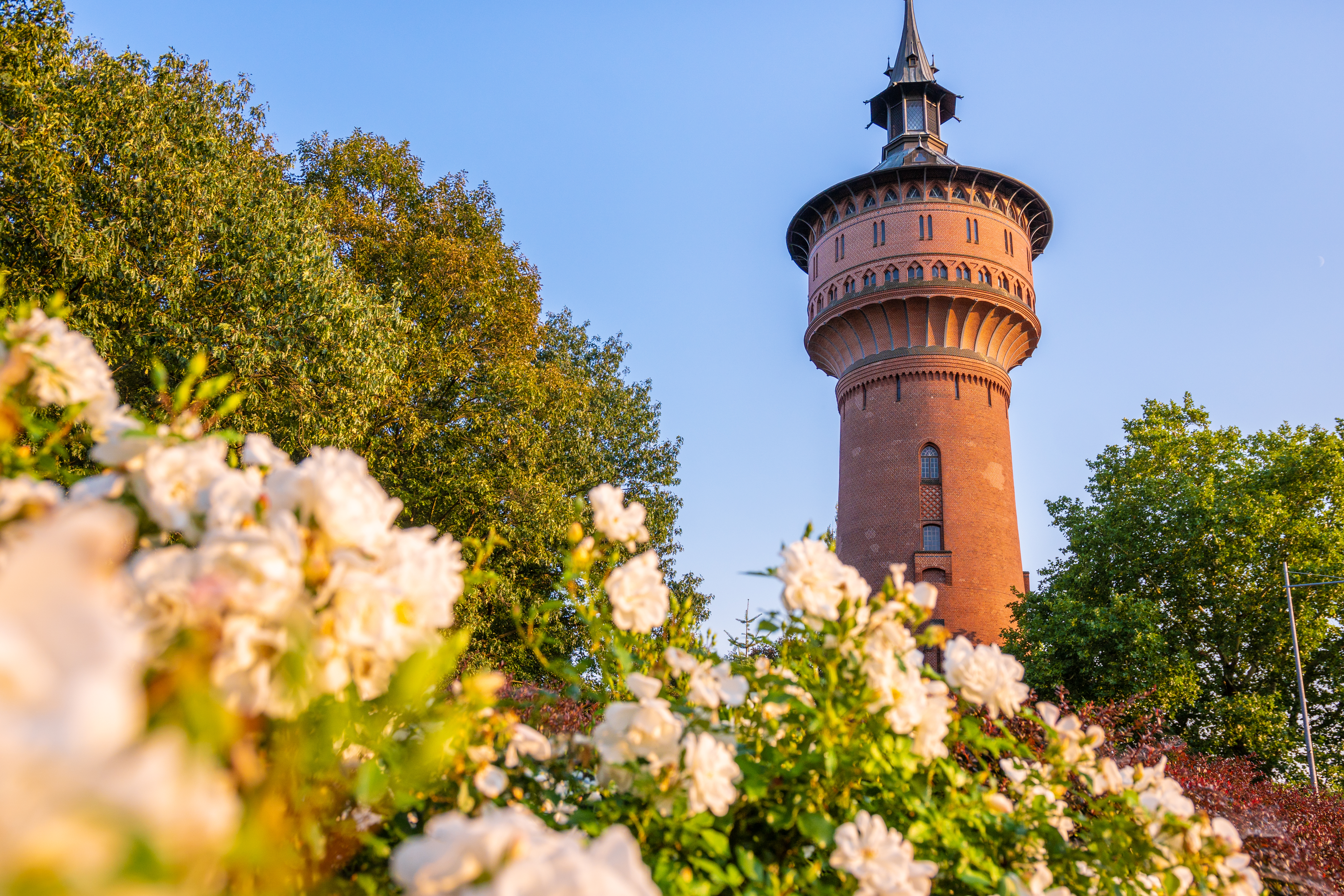 Forster Wahrzeichen - Der Wasserturm mit Rosen im Vordergrund